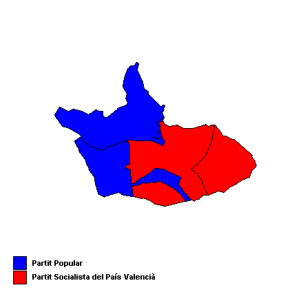 Partits polítics més votats als municipis del Racó d'Ademús (País Valencià) després de les eleccions municipals de 2007.